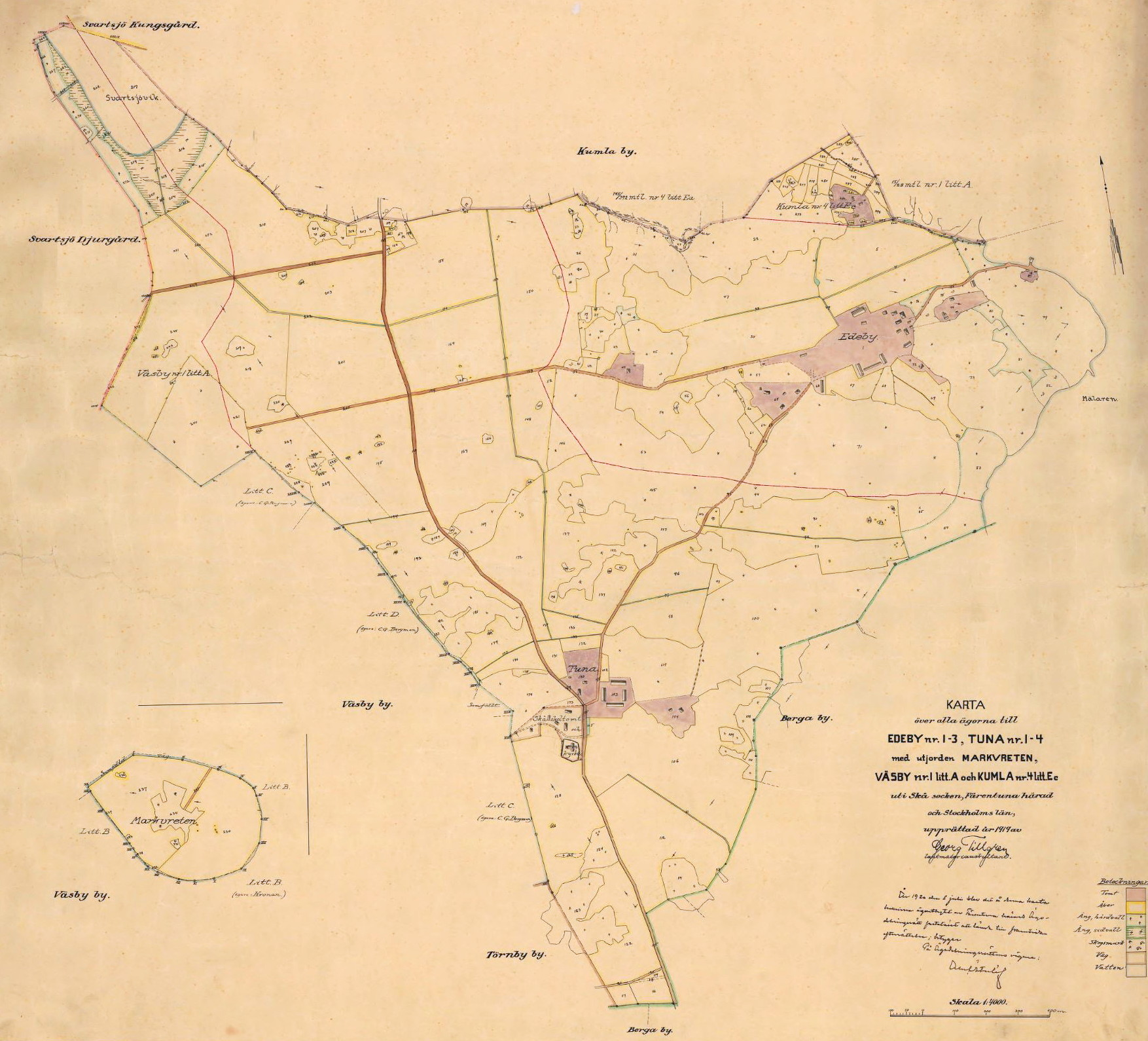 Edeby gård och Tuna gård, Skå socken, Ekerö kommun, 1919